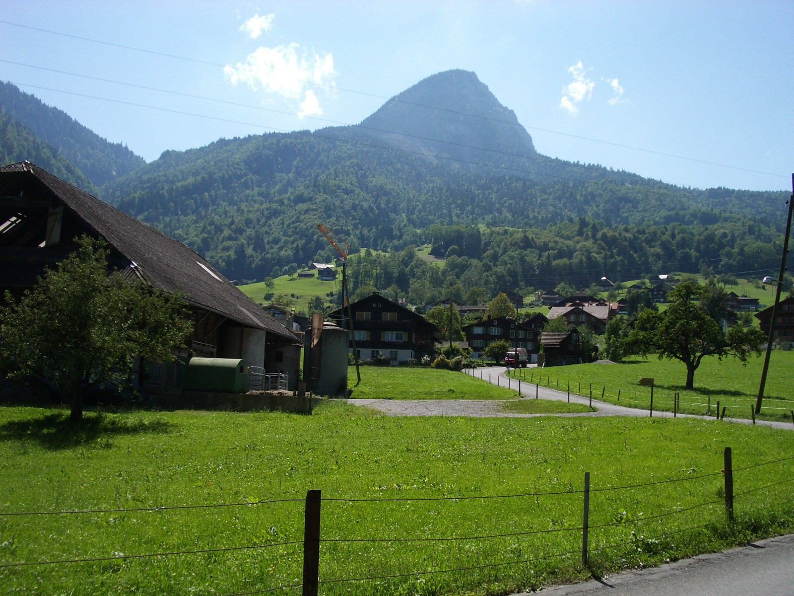 Giswil OW, Switzerland